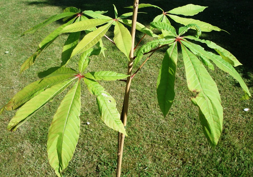 Asculus assamica